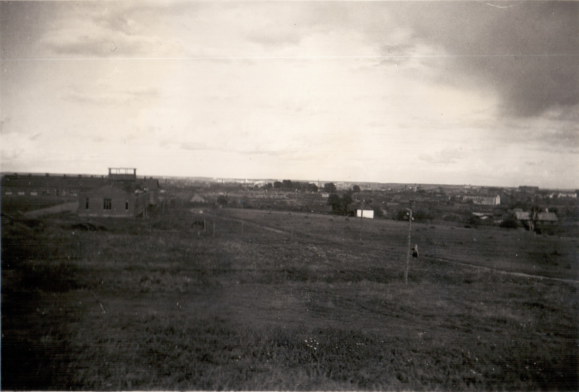 Беларуская (тарашкевіца): Менск (Miensk), Тучынка (Tučynka)